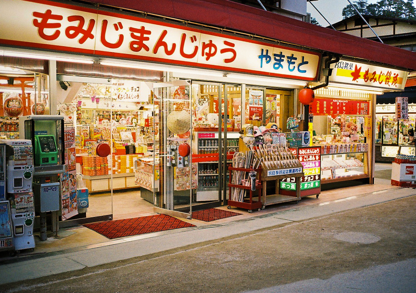 Miyajima, Hiroshima, Japan 2012/03 CONTAX T3 + Fujifilm NATURA 1600 Momiji Manju Shop